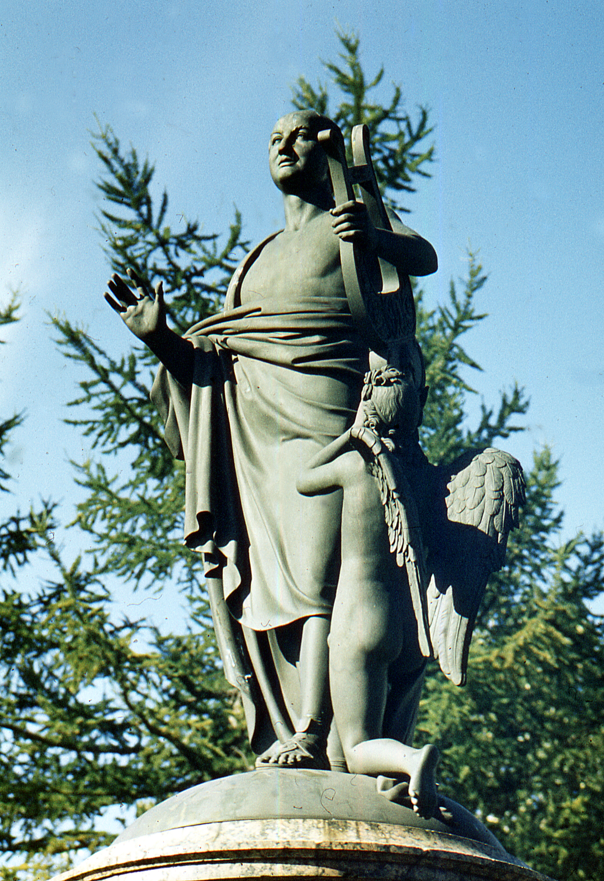 Памятник Ломоносову